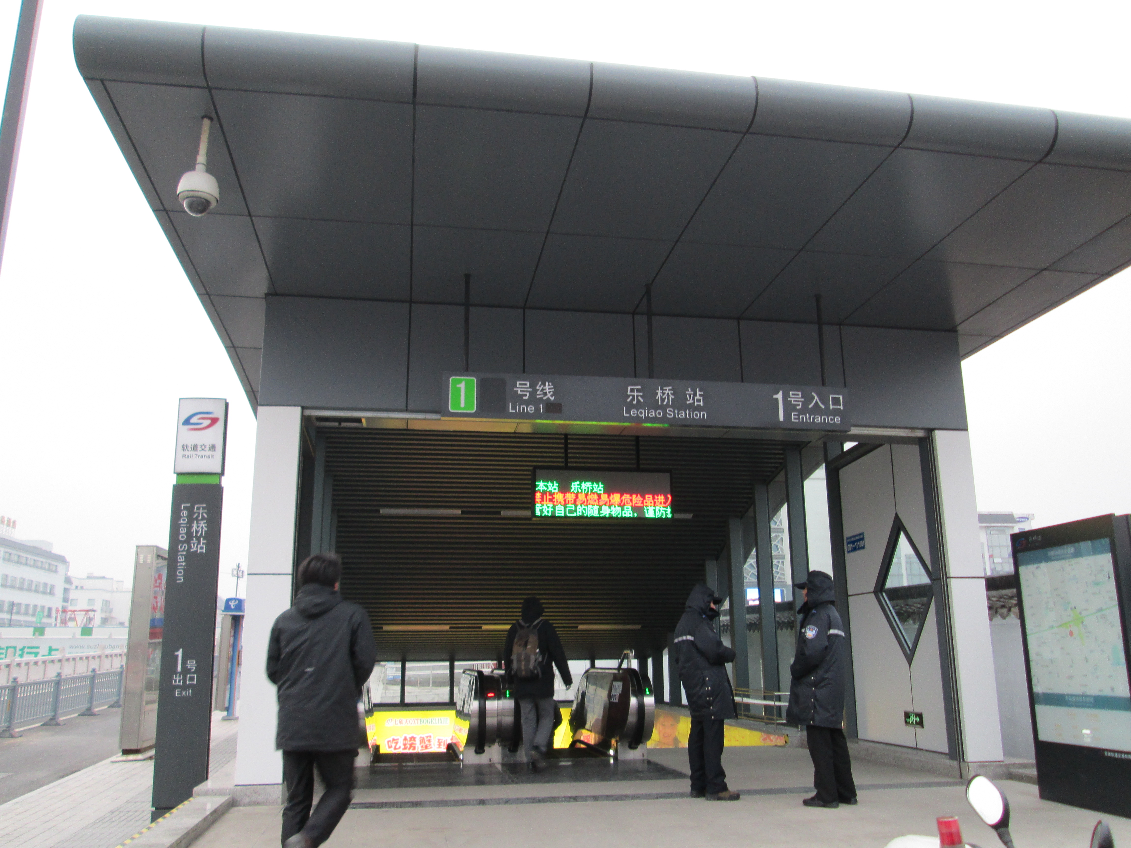 苏州轨道交通乐桥站出口